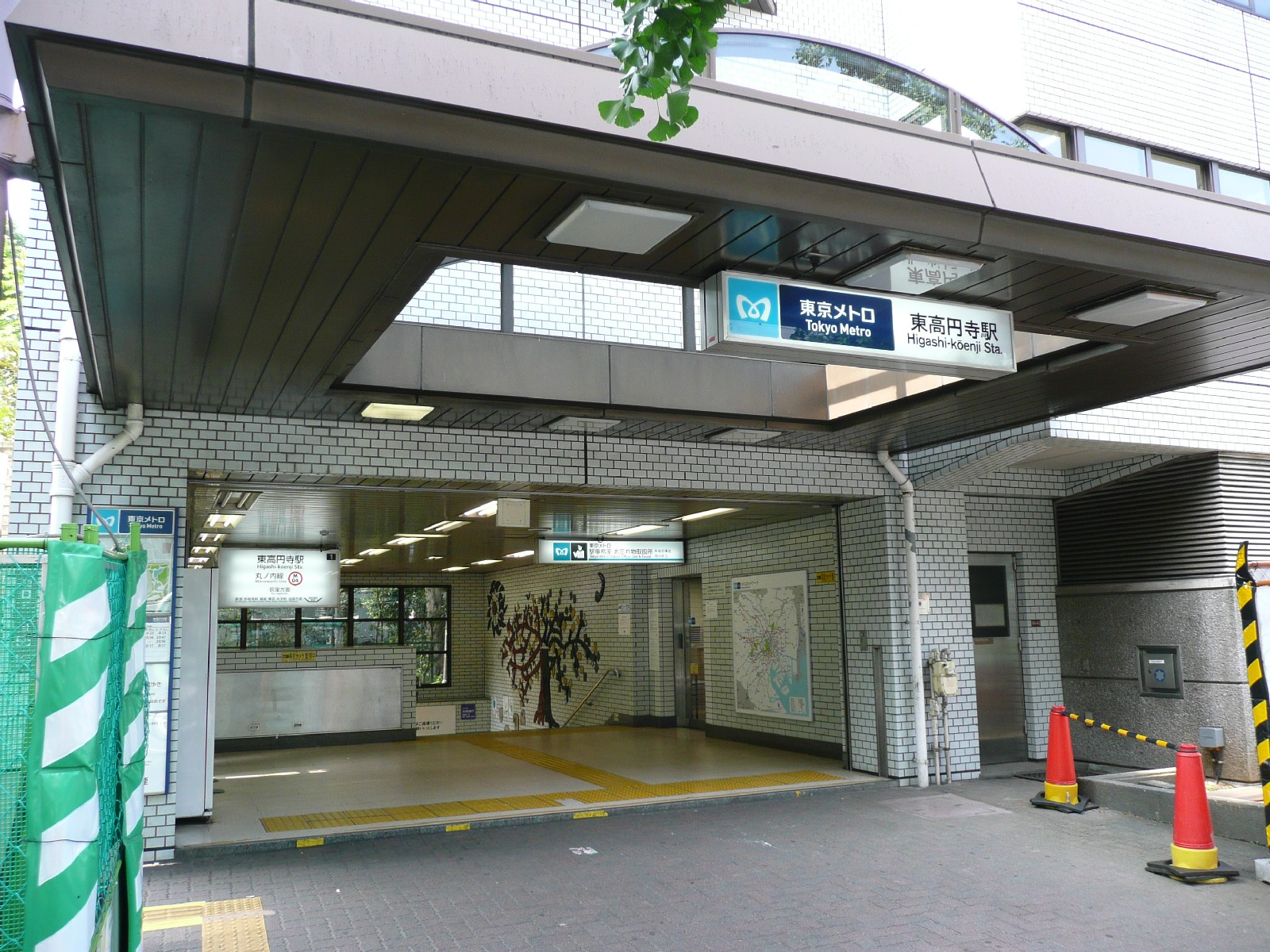 東高円寺駅1番出入口